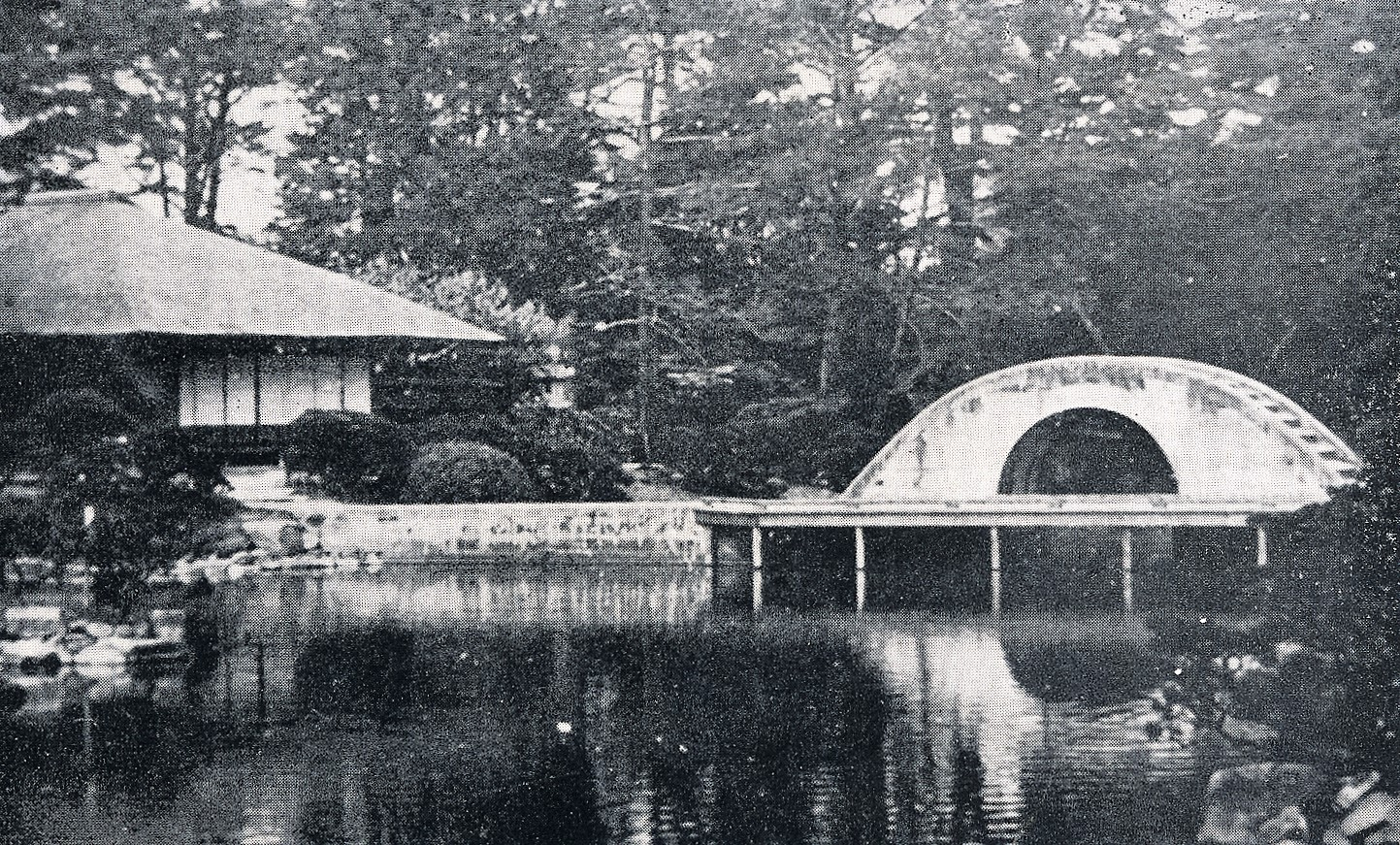 戦前の縮景園